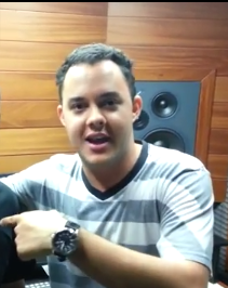 Gui Santana 2013